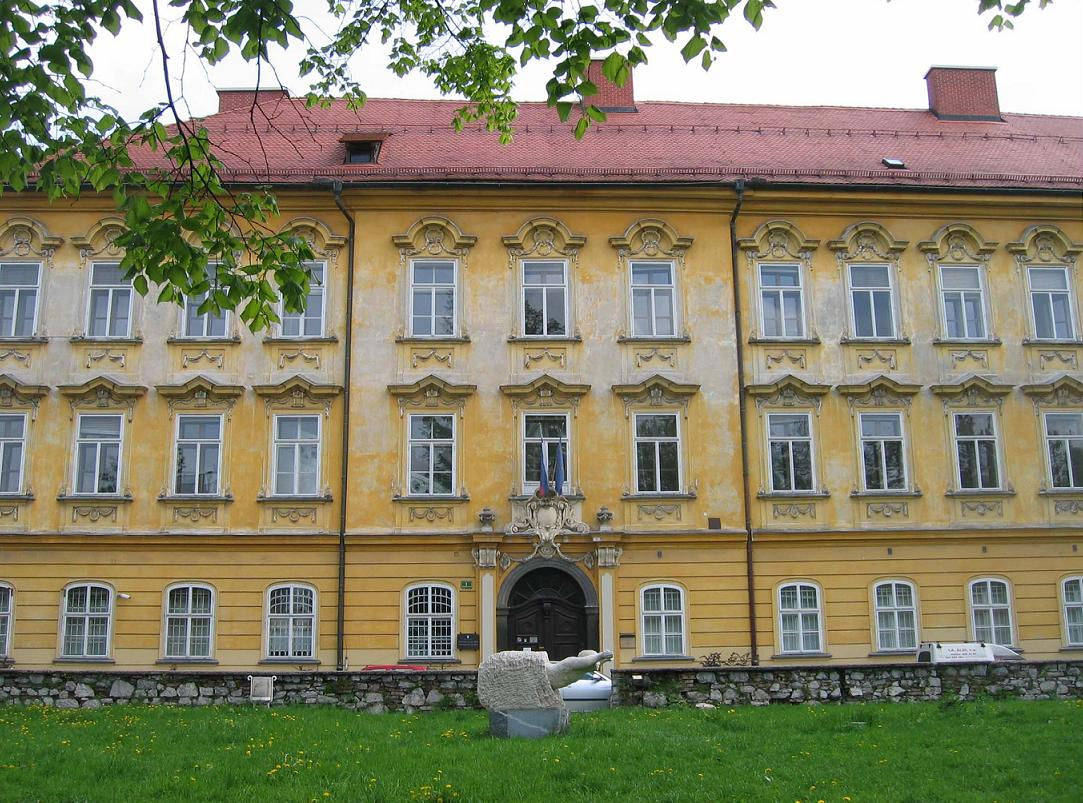 Gruber hall, Ljubljana photo:Ziga 14:20, 1 May 2006 (UTC)